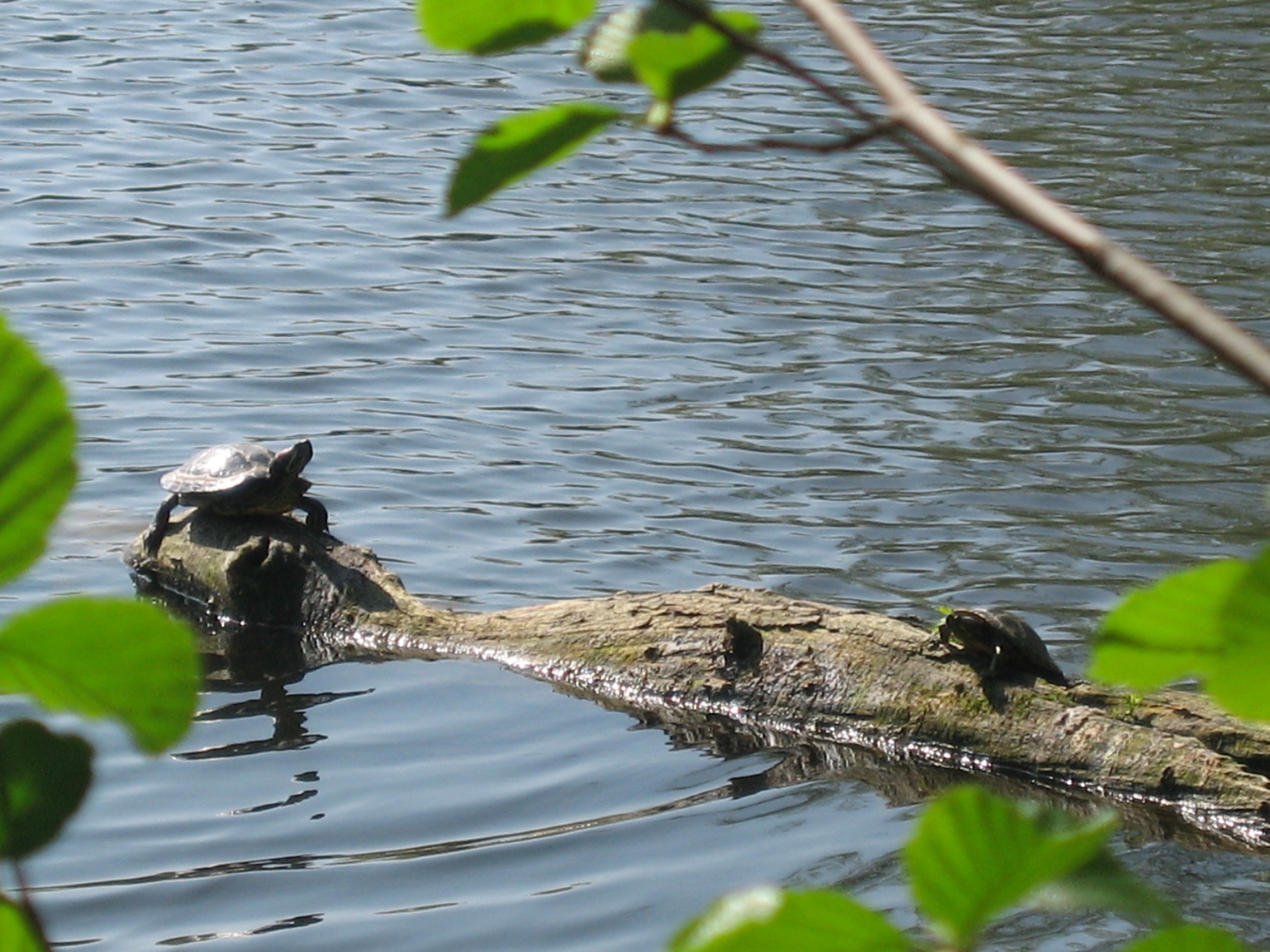 Aradosee Potsdam - Gelbwangen-Schmuckschildkröten Trachemys scripta scripta